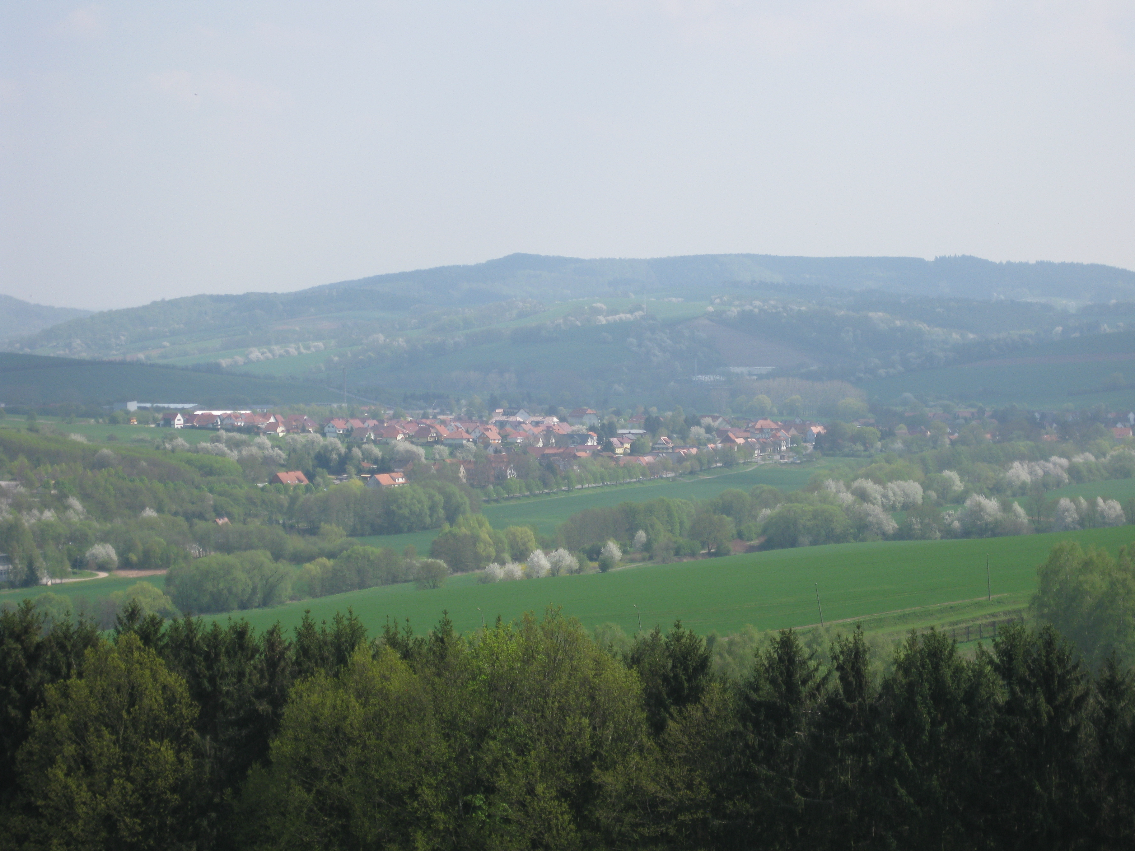 Blick auf Teistungen (im Hintergrund der Zehnsberg mit der Zinkspitze)